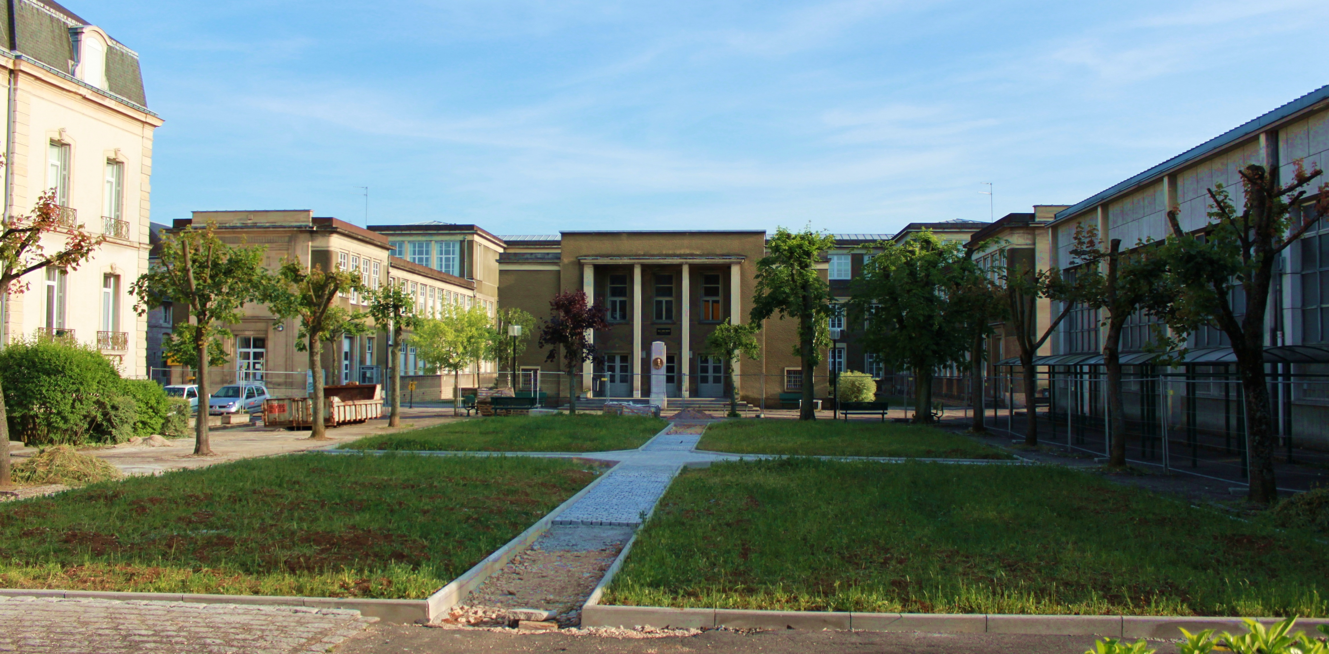 Dijon, Bourgogne, FRANCE